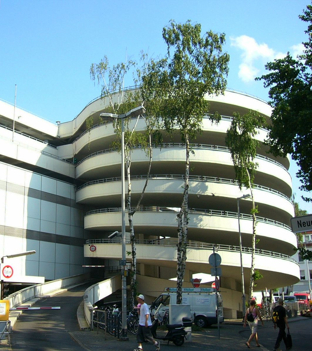 Spiralförmige Auffahrt zum Parkhaus in der Neuen Straße in Braunschweig (Karstadt), sog. "Spindel"